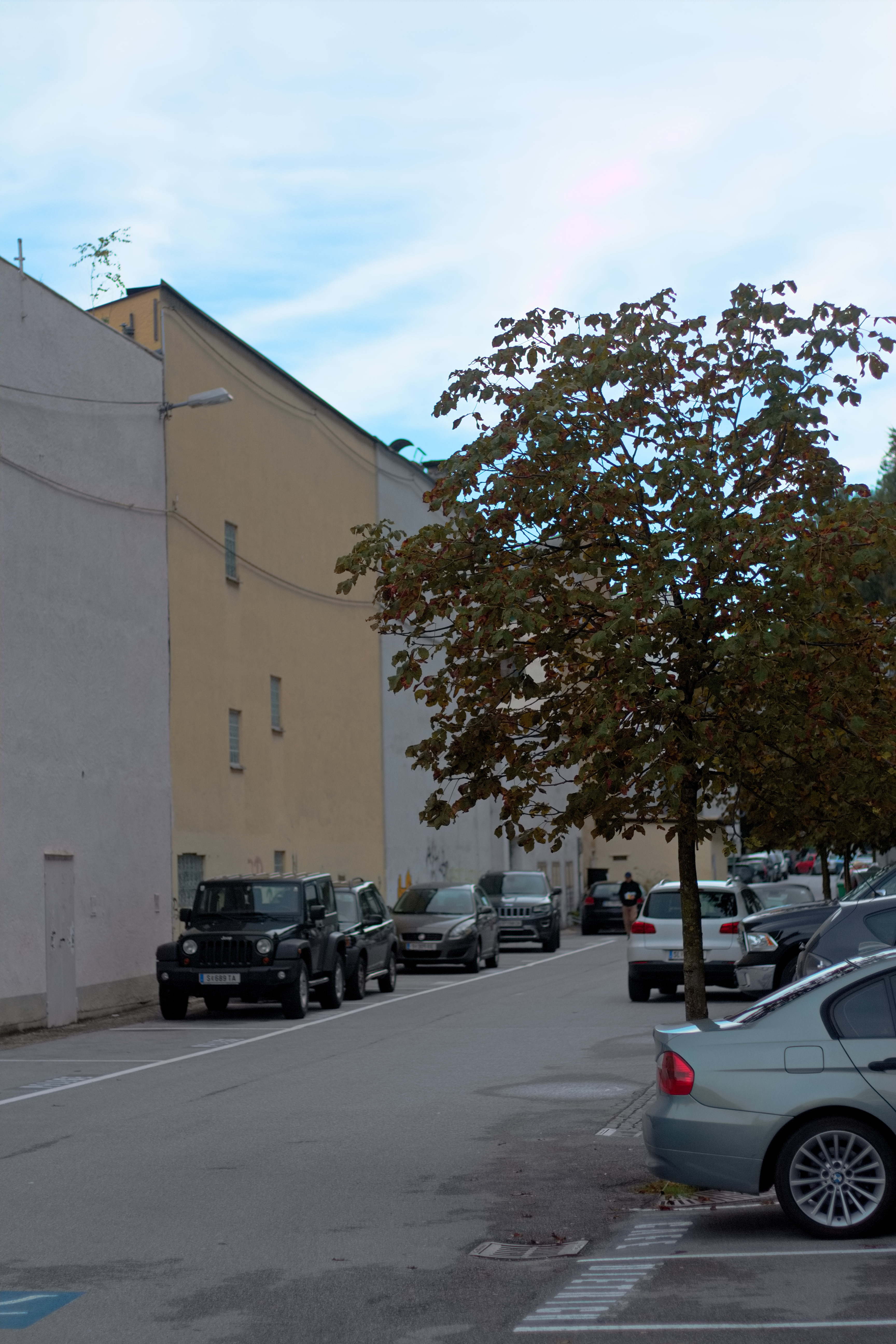 Ein Abschnitt der Glockengasse im Salzburger Stadtteil Neustadt